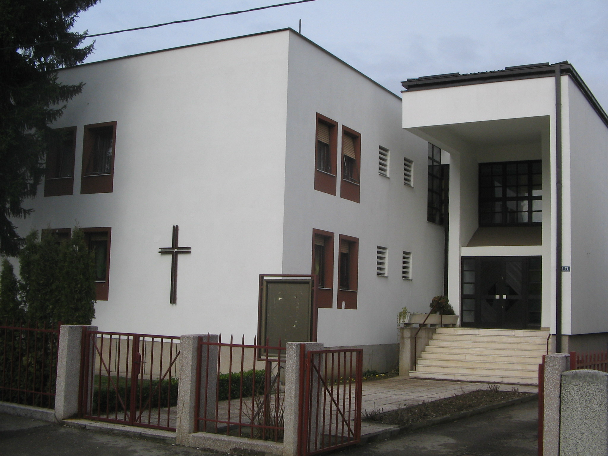 Адвентистичка_црква_у_Бањој_Луци